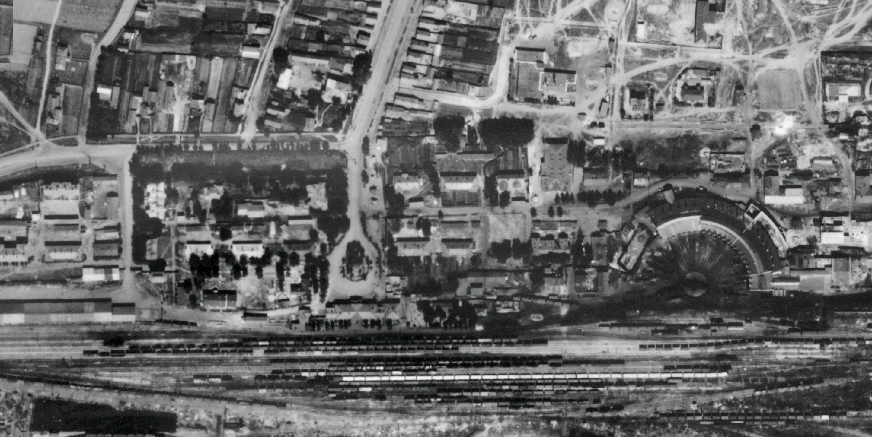 Станция Ржев-Балтийский на аэрофотоснимках Люфтваффе 1941 г.